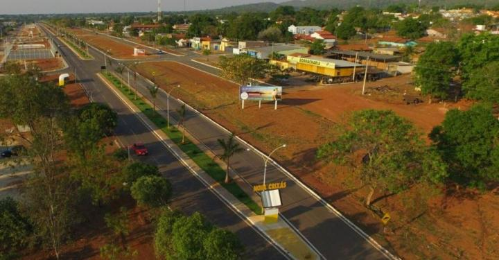 Entrada do município de Nova Crixás